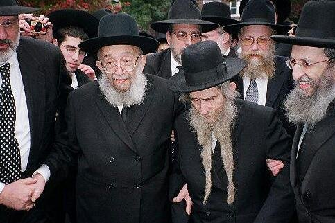 ביקור הרב שטיינמן בארצות הברית, בתמונה יחד עם הרב שווי והרב קמינצקי